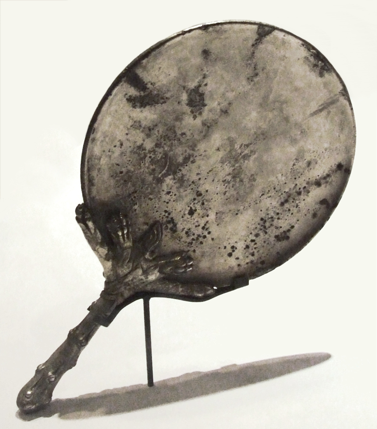 Silberspiegel, Fundstück aus Pompeji, fotografiert während der Pompeji-Ausstellung Europäischer Kulturpark Bliesbruck-Reinheim 2007, Ausschnitt eines Bildes; silver mirror from Pompeii